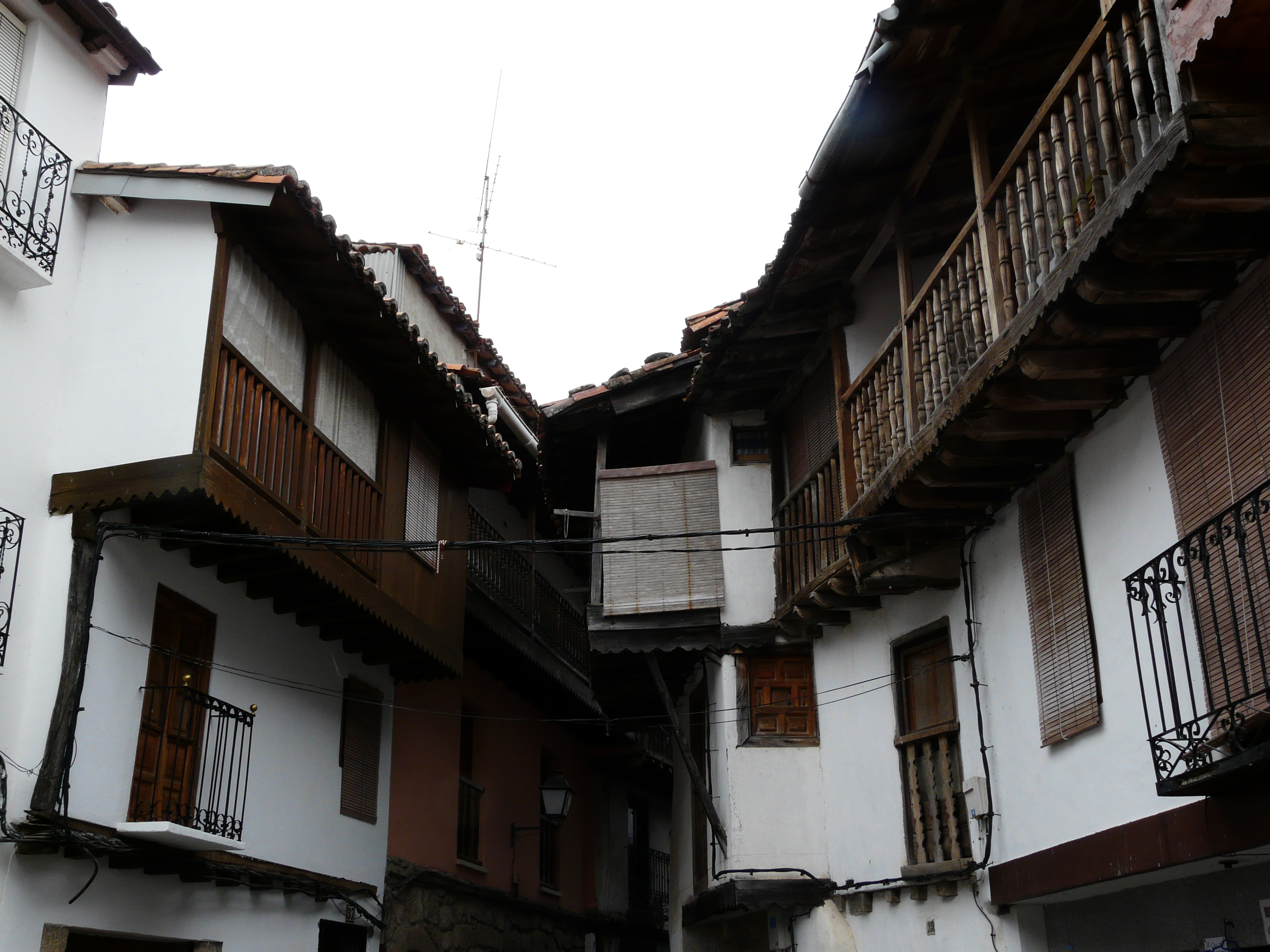 Casas típicas en Villanueva de la Vera, provincia de Cáceres, España.